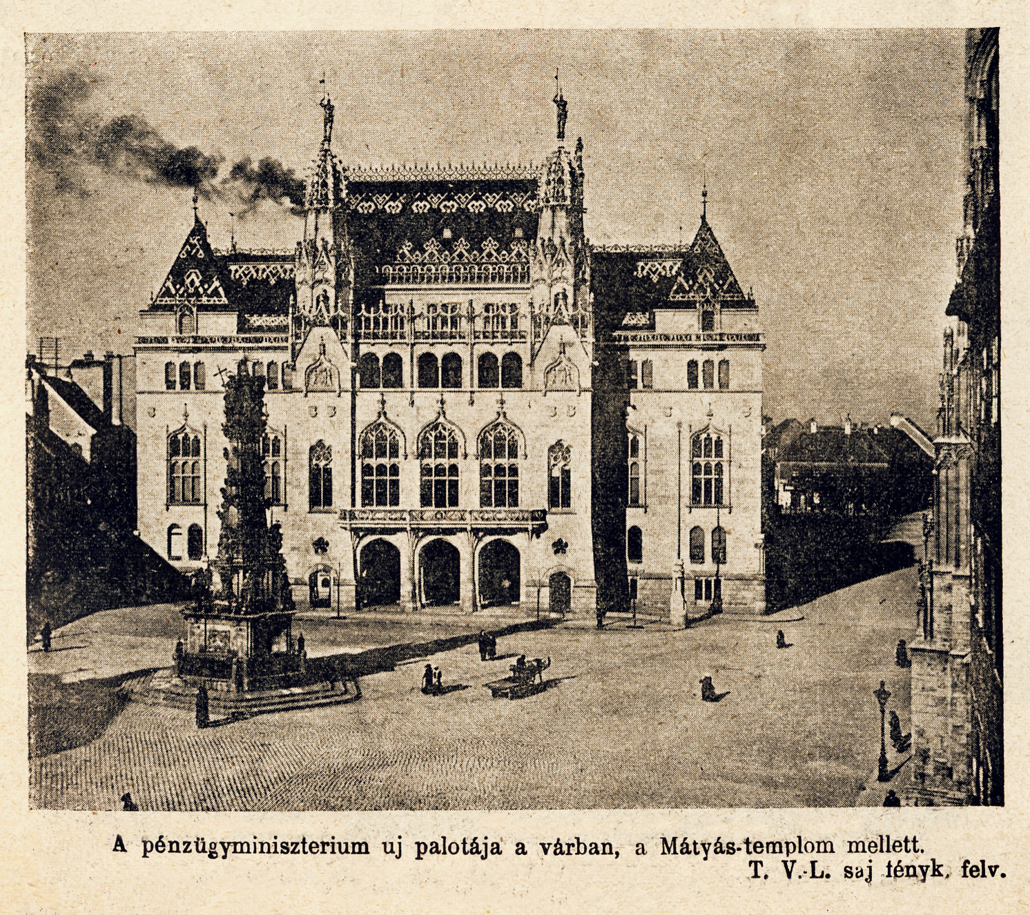 Budapest, Várnegyed, Pénzügyminisztérium volt épülete, 1906.